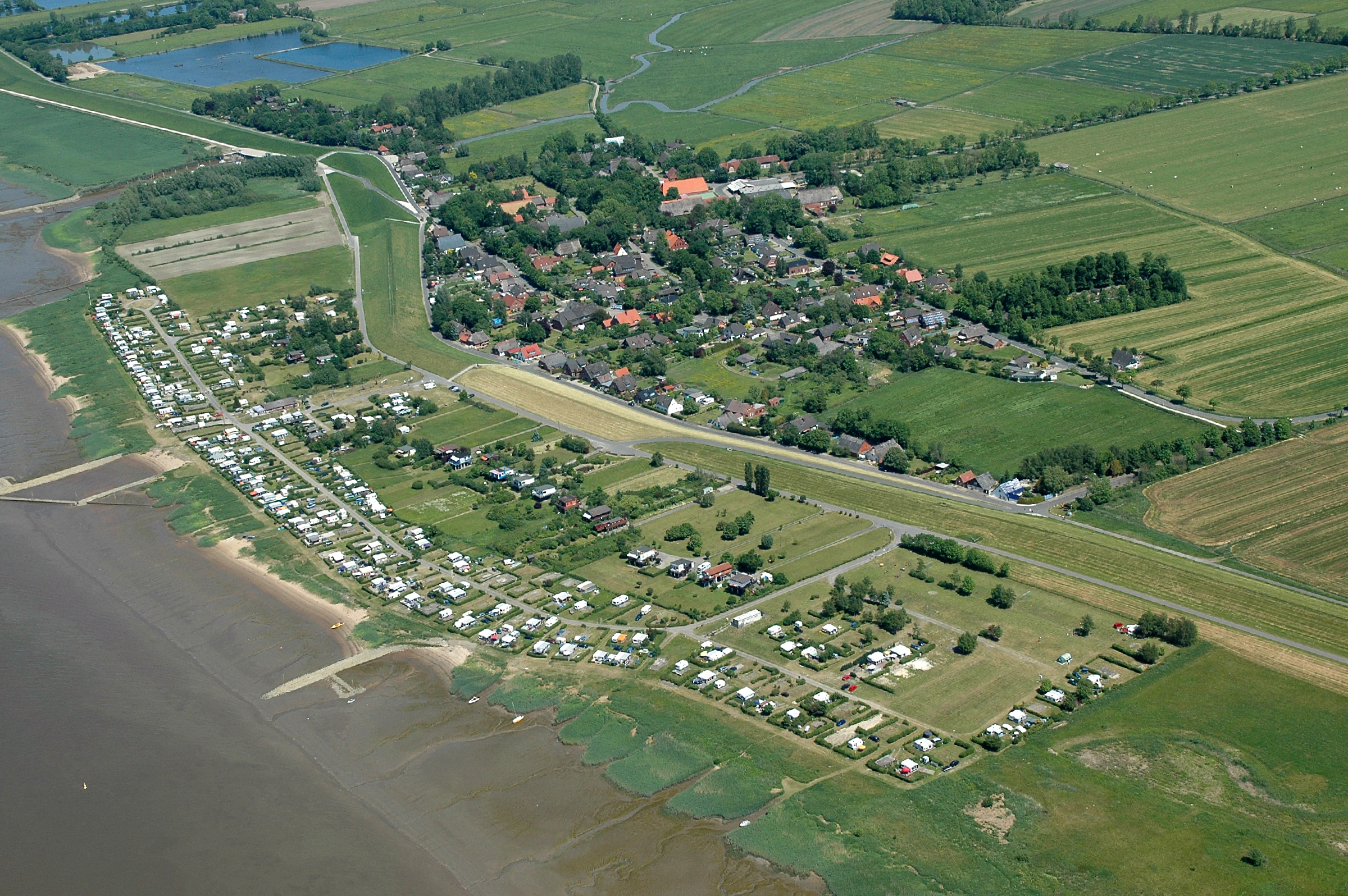 Fotoflug vom Flugplatz Nordholz-Spieka über Cuxhaven und Wilhelmshaven